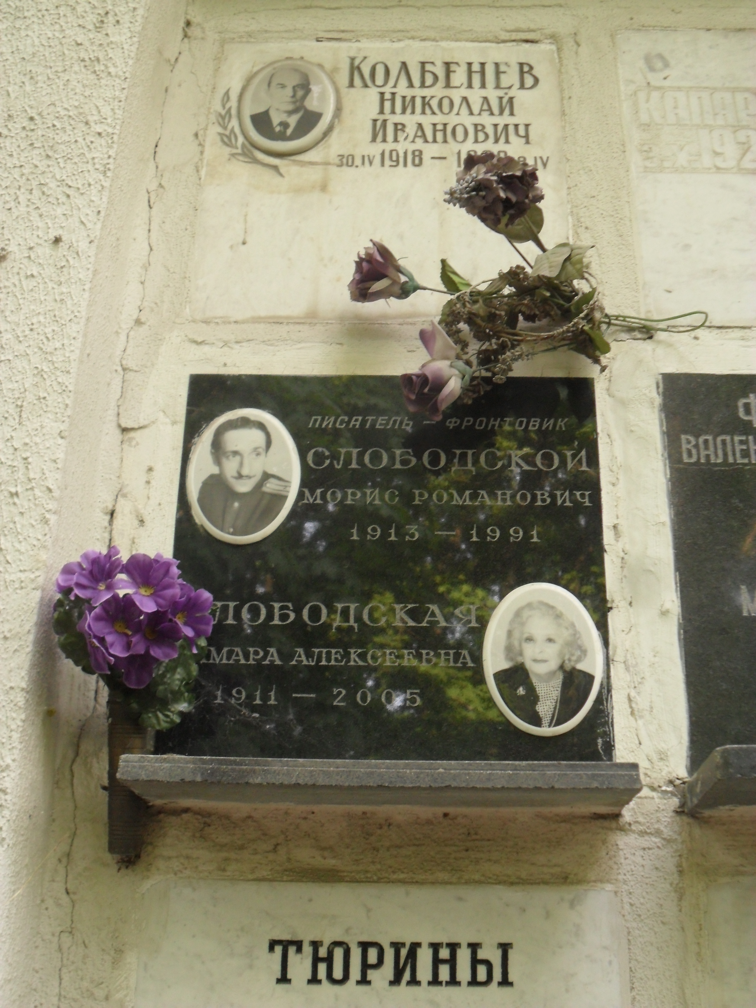 Плита колумбария, где покоится прах писателя Мориса Слободского.